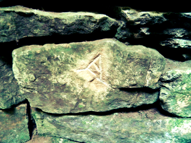 Символът на входа на храм-паметника